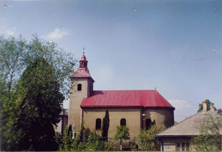 Church Sv.Martina - Frickovce Village(Slovakia)